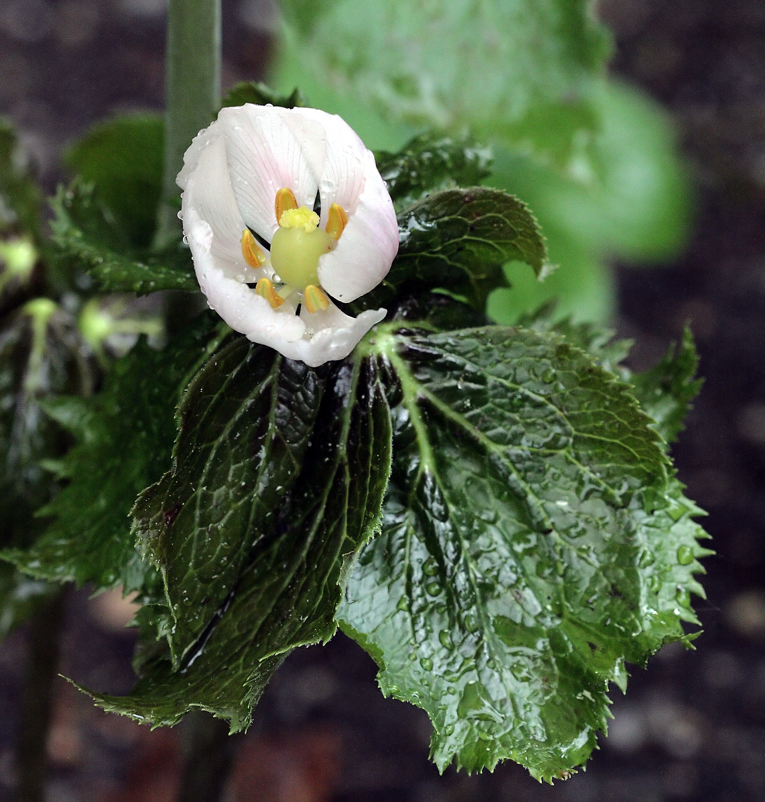 Blume unid.